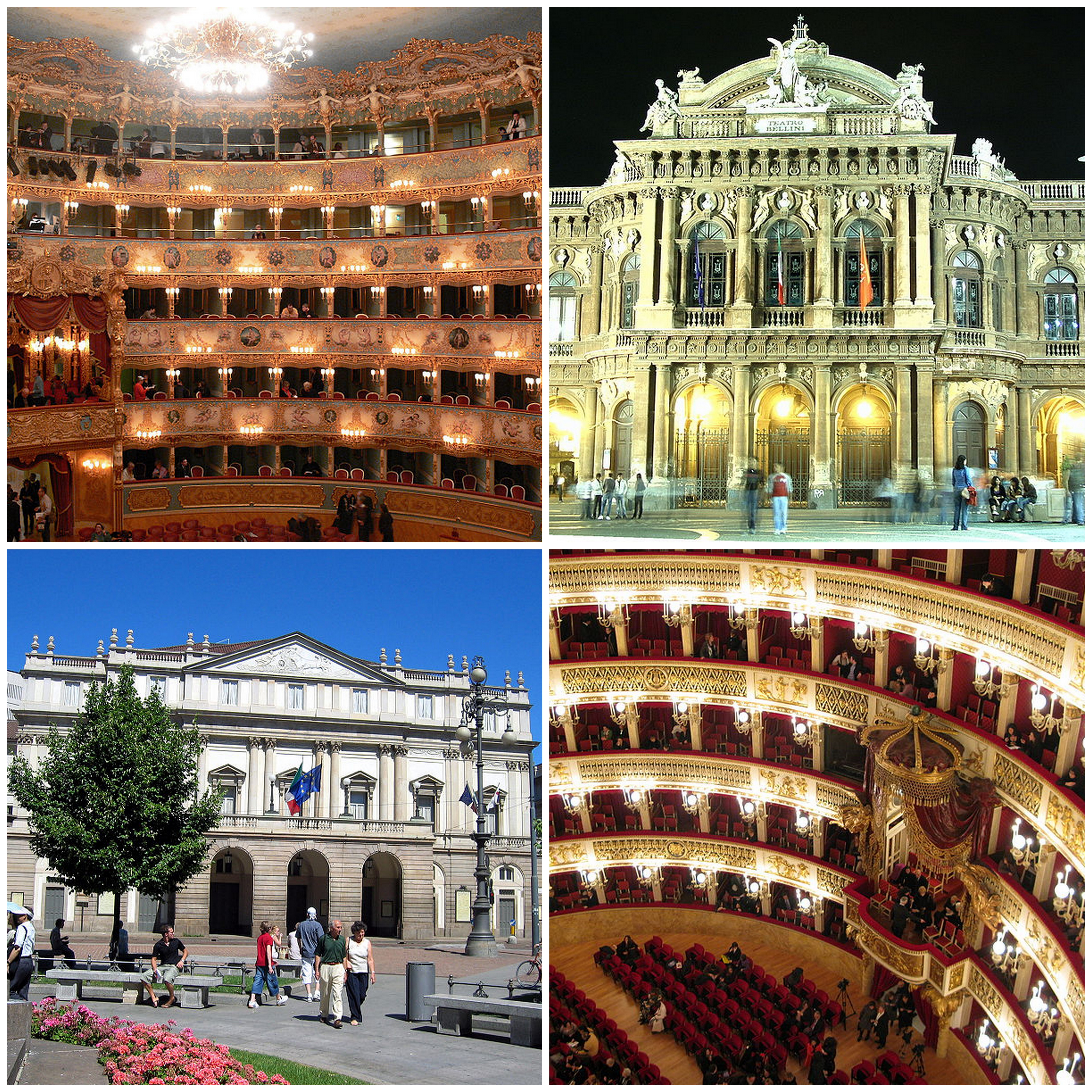 Collage di quattro foto su teatri italiani.